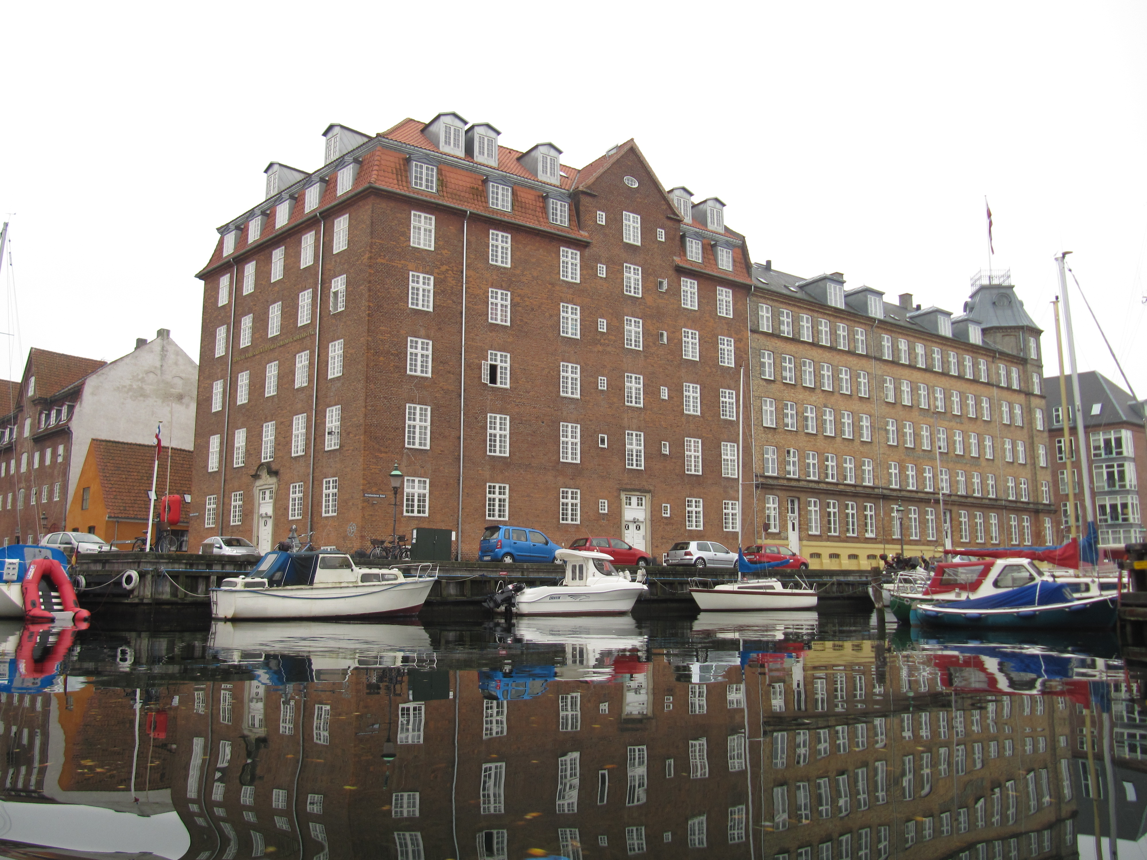 Prinsesse Maries Hjem for Gamle Sømænd og Sømænds Enker at Christianshavns Kanal in Copenhagen, Denmark